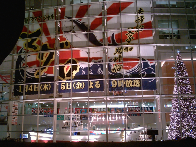 TV_Asahi Roppongi_Roppngi_Hills Tokyo Japan